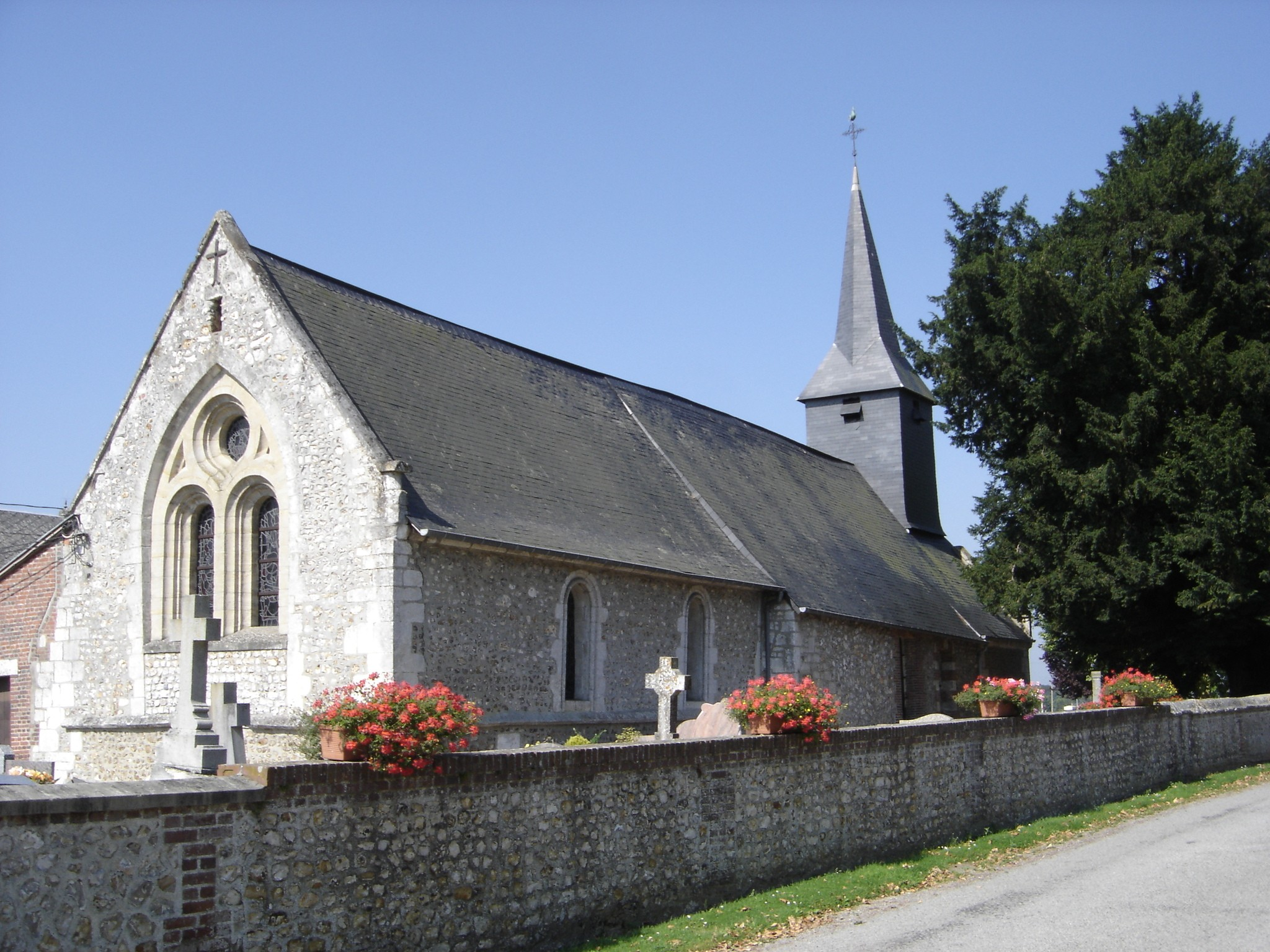 Église Saint-Thibault (hameau de Blacarville) à Saint-Mards-de-Blacarville - Eure - France